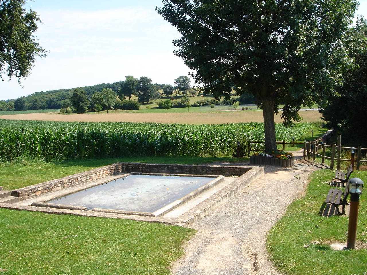 Lavoir de Civrieux en Dombes